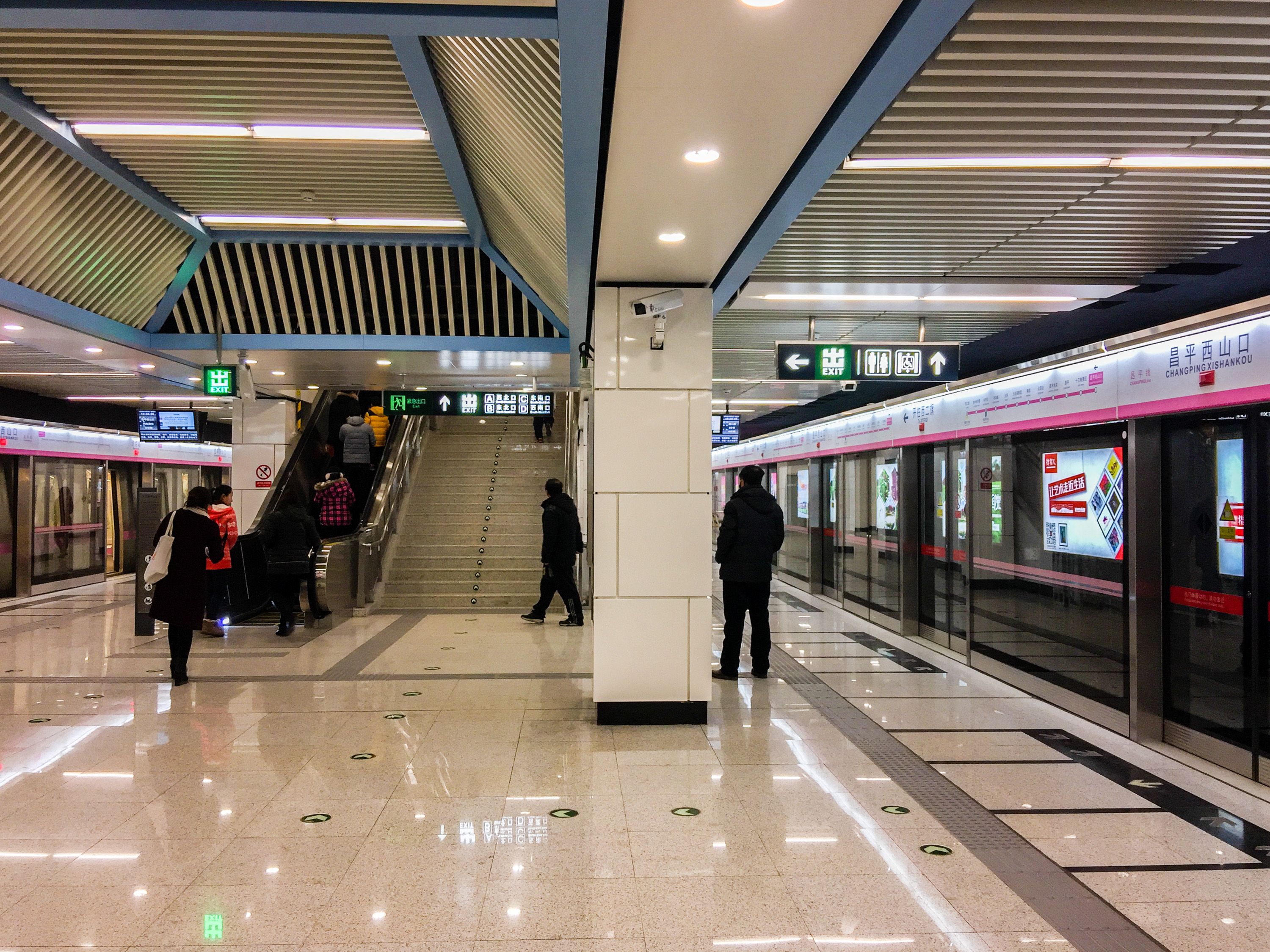 中文（中国大陆）: 北京地铁昌平线昌平西山口站站台，2015年12月26日